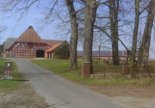 Kirchlinteln: Bauernhof